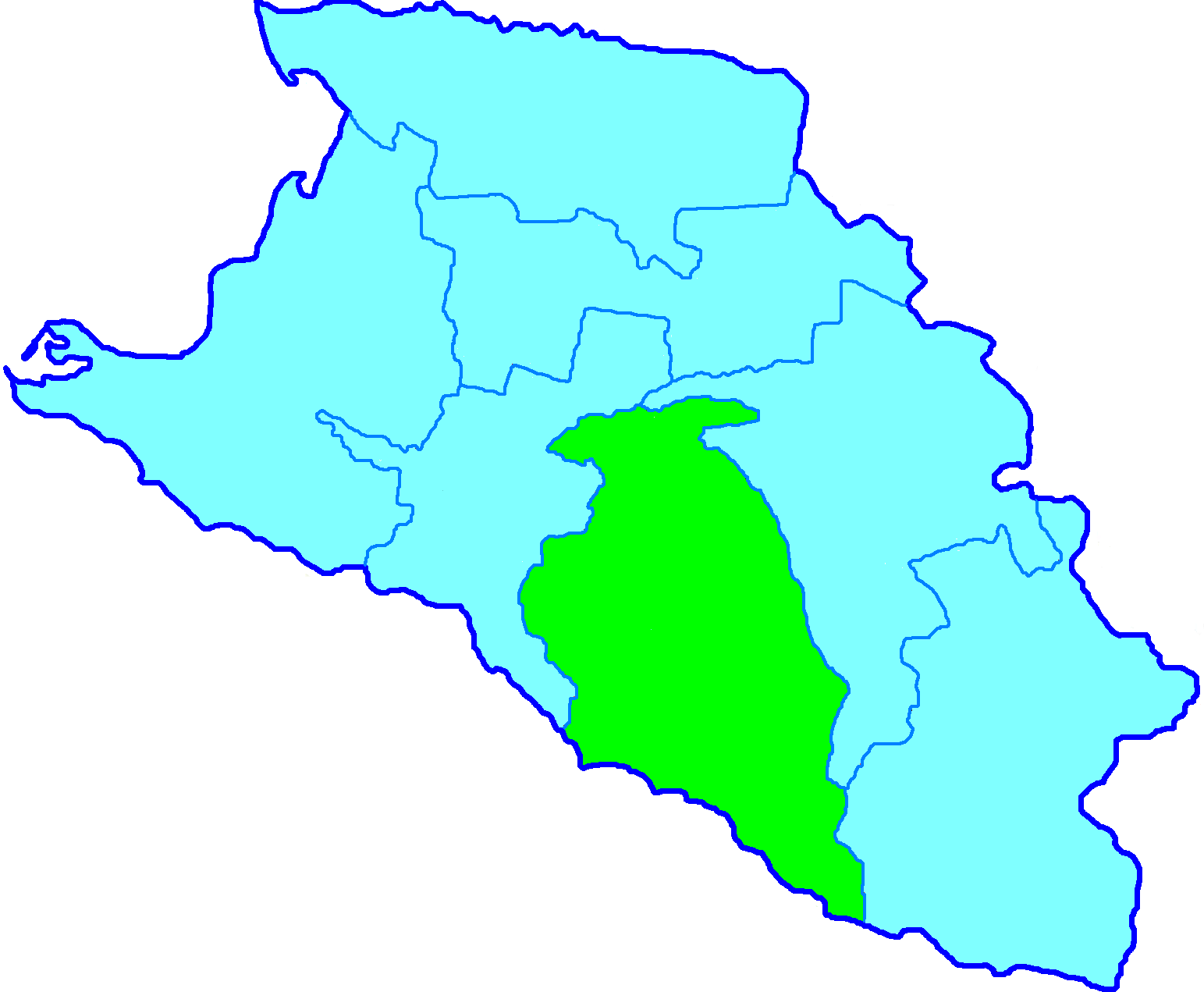 Майкопский отдел на карте Кубанской области